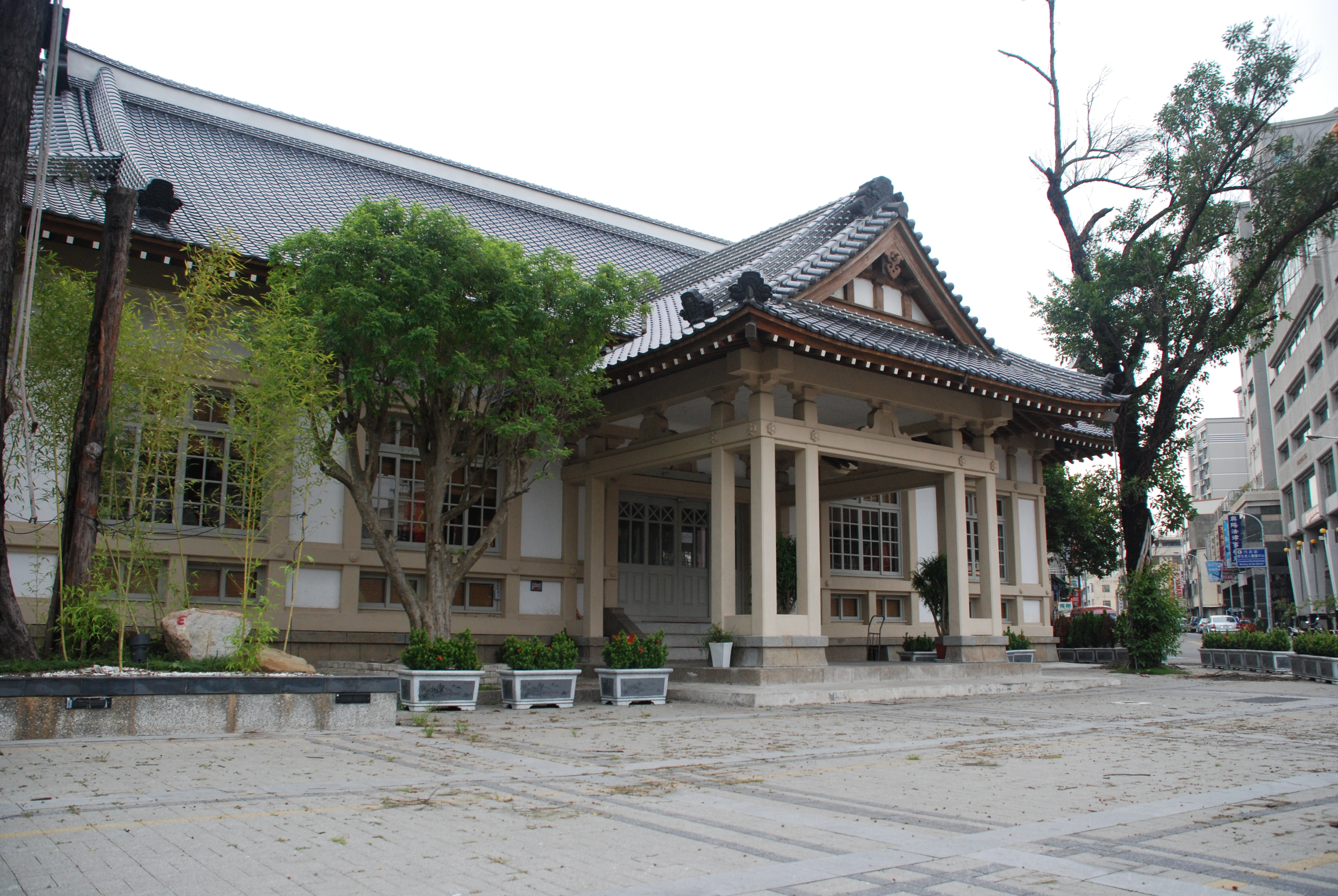 中文（台灣）: 彰化市武德殿是一棟日式建築，為日據時代日本習武崇尚武德之處，現做為忠烈祠